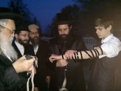 בהנחת תפילין בבארדיטשוב